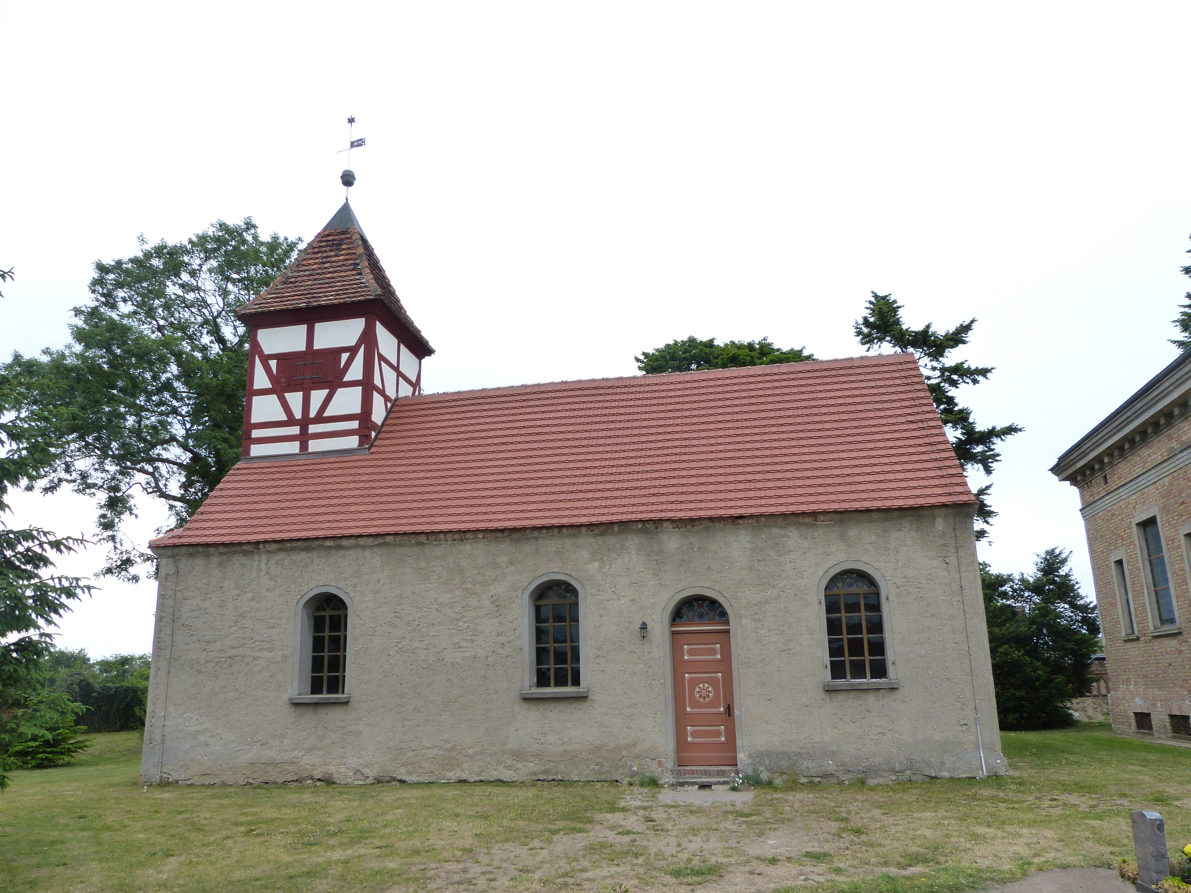 Kirche in Auerose, Gemeinde Neu Kosenow, Südseite